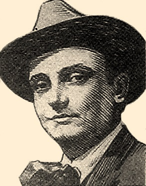 Traian Grozăvescu